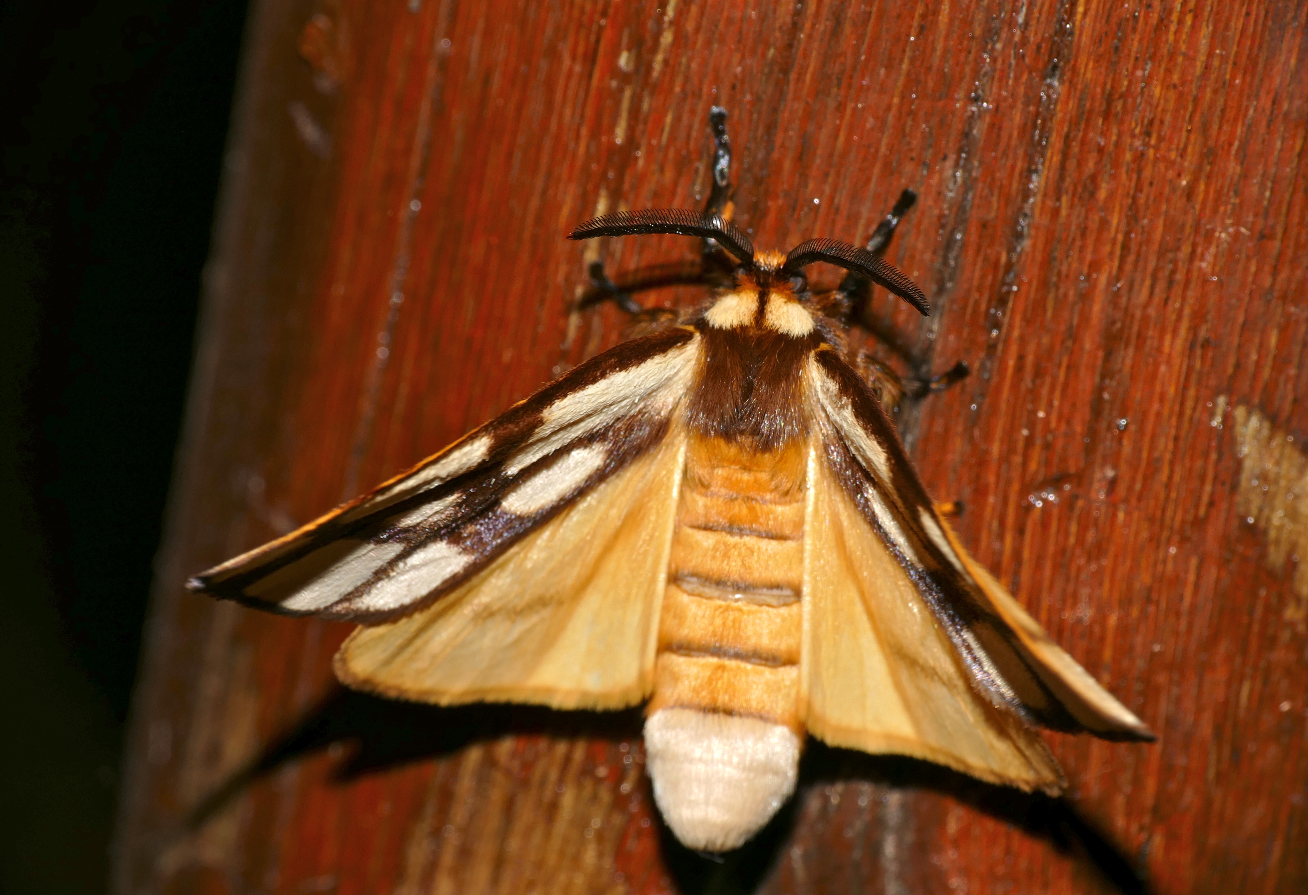 Lower Sabie Camp, Kruger NP, SOUTH AFRICA